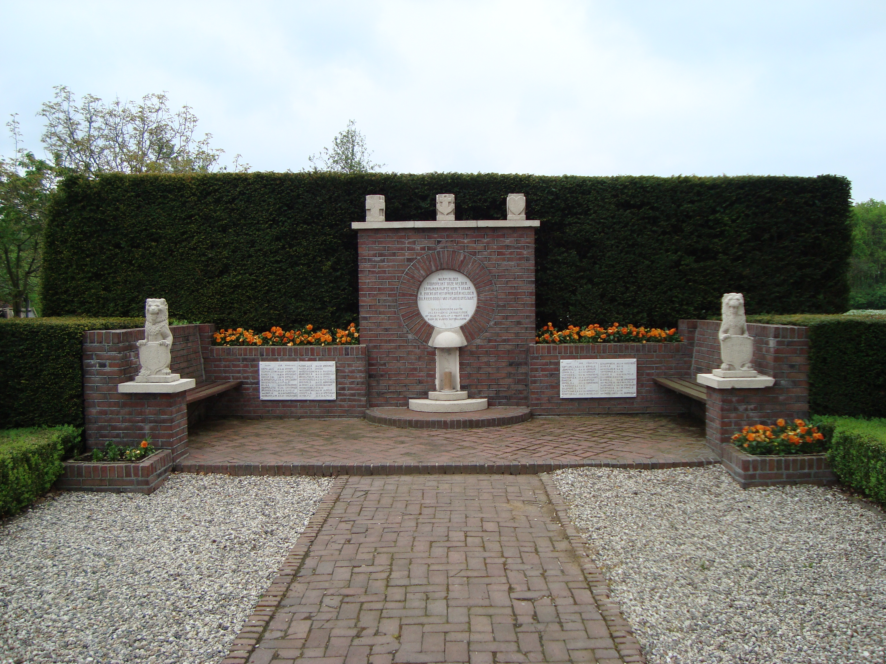 Verzetsmonument aan de Rademakersbroek Varsseveld